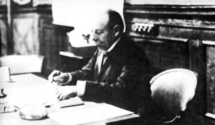 Serapio Calderón Chirinos (1843 - 1922), abogado y orador cuzqueño, fue presidente del Perú de abrila a setiembre de 1904.